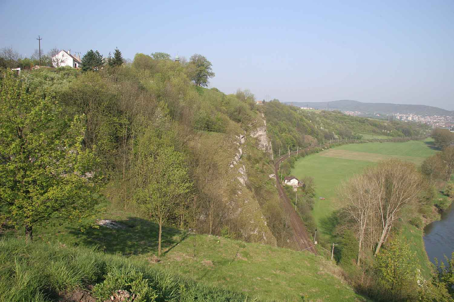 Fotografie PR Tetínské skály ze zříceniny hradu v Tetíně